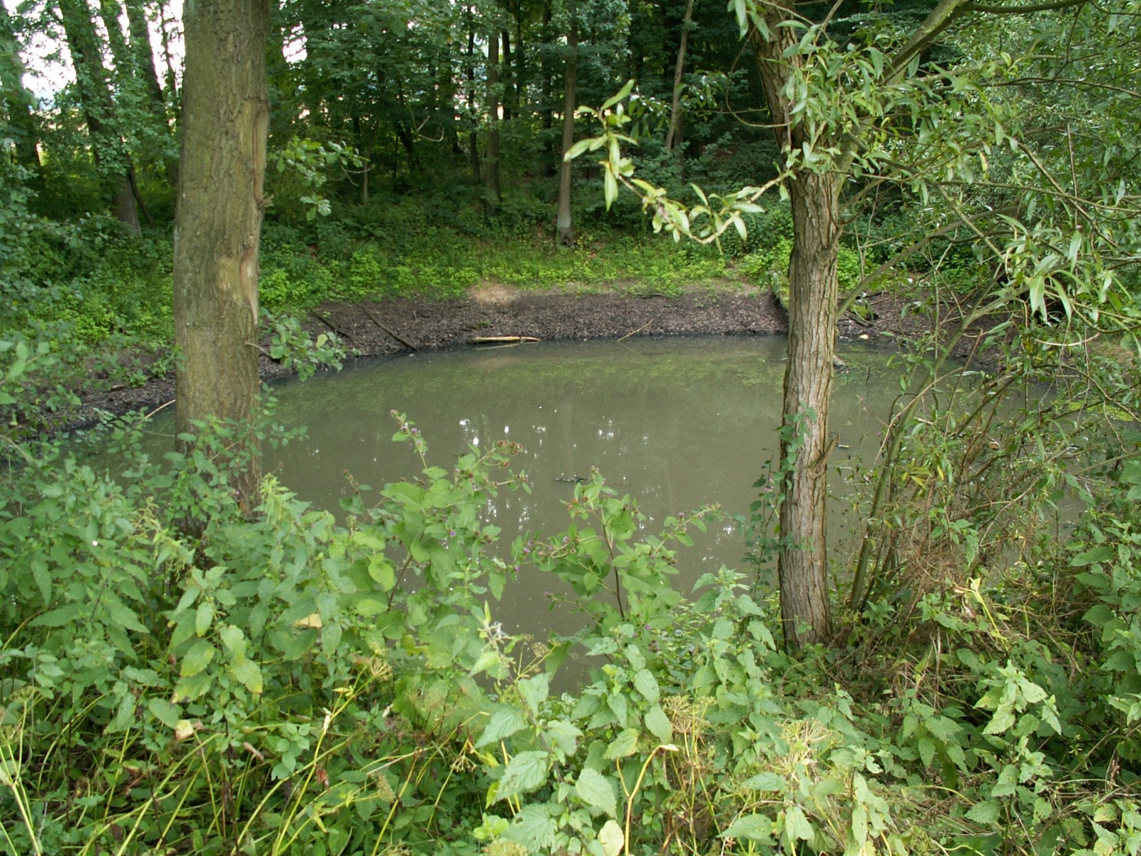 Das Icker Loch bei Belm, eine Doline. Ansicht von Nordosten, aufgenommen am 3. August 2005.